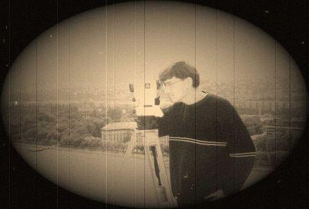 Mérőállomással dolgozó geodéta